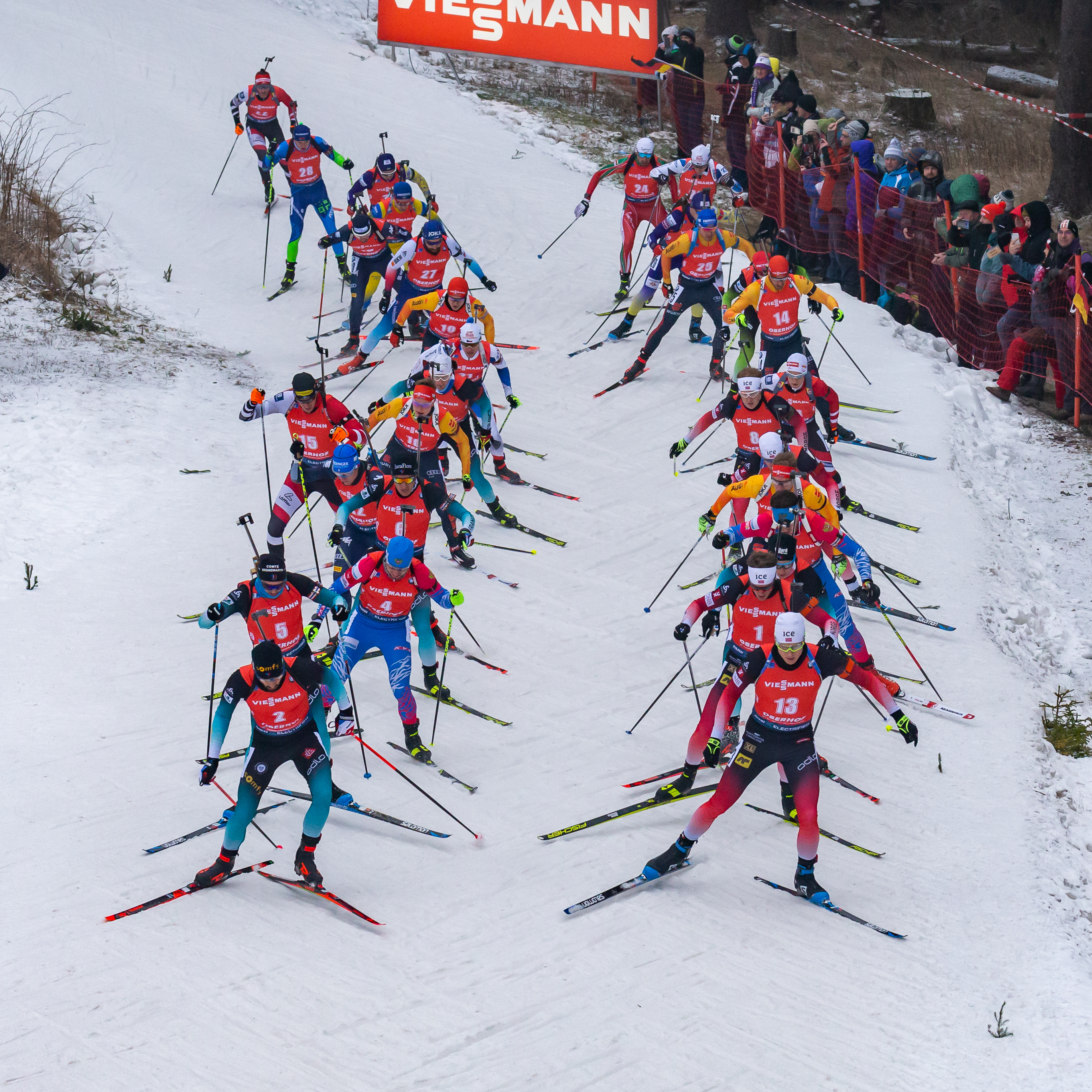 IBU World Cup Biathlon Oberhof; Massenstart der Männer; Anstieg